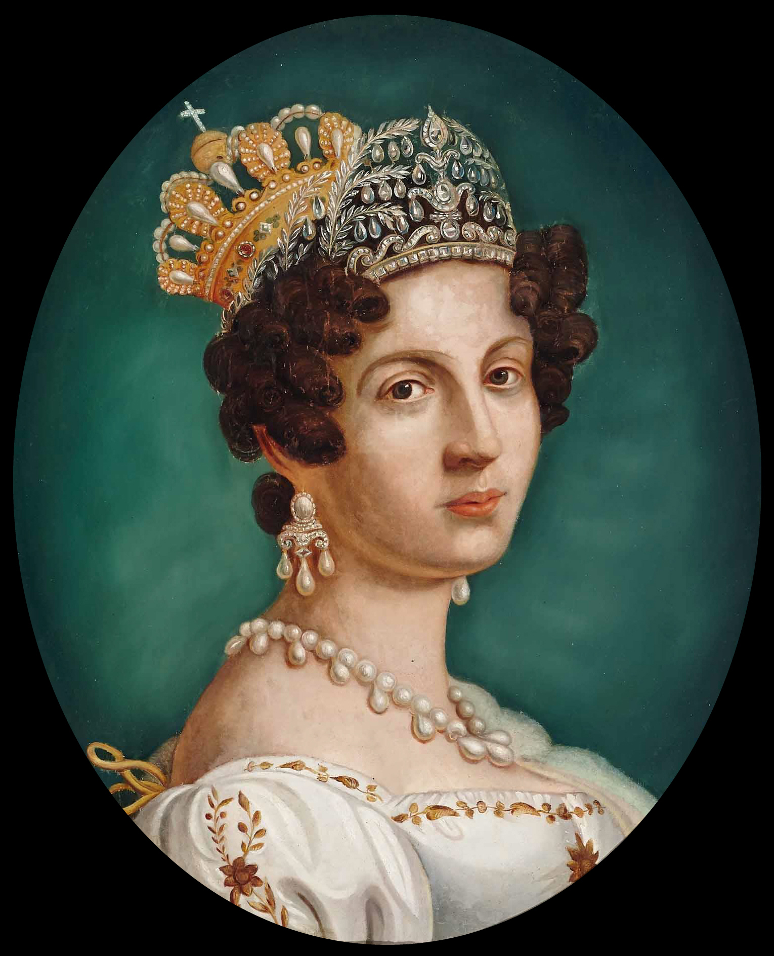 "Königin Therese von Bayern (1792-1854), Gemahlin König Ludwig I v. Bayern", Öl auf Karton, ca. 55 x 45 cm, oval gerahmt, wohl 2. Hälfte 19. Jahrhunderts, wohl nach einem Kupferstich